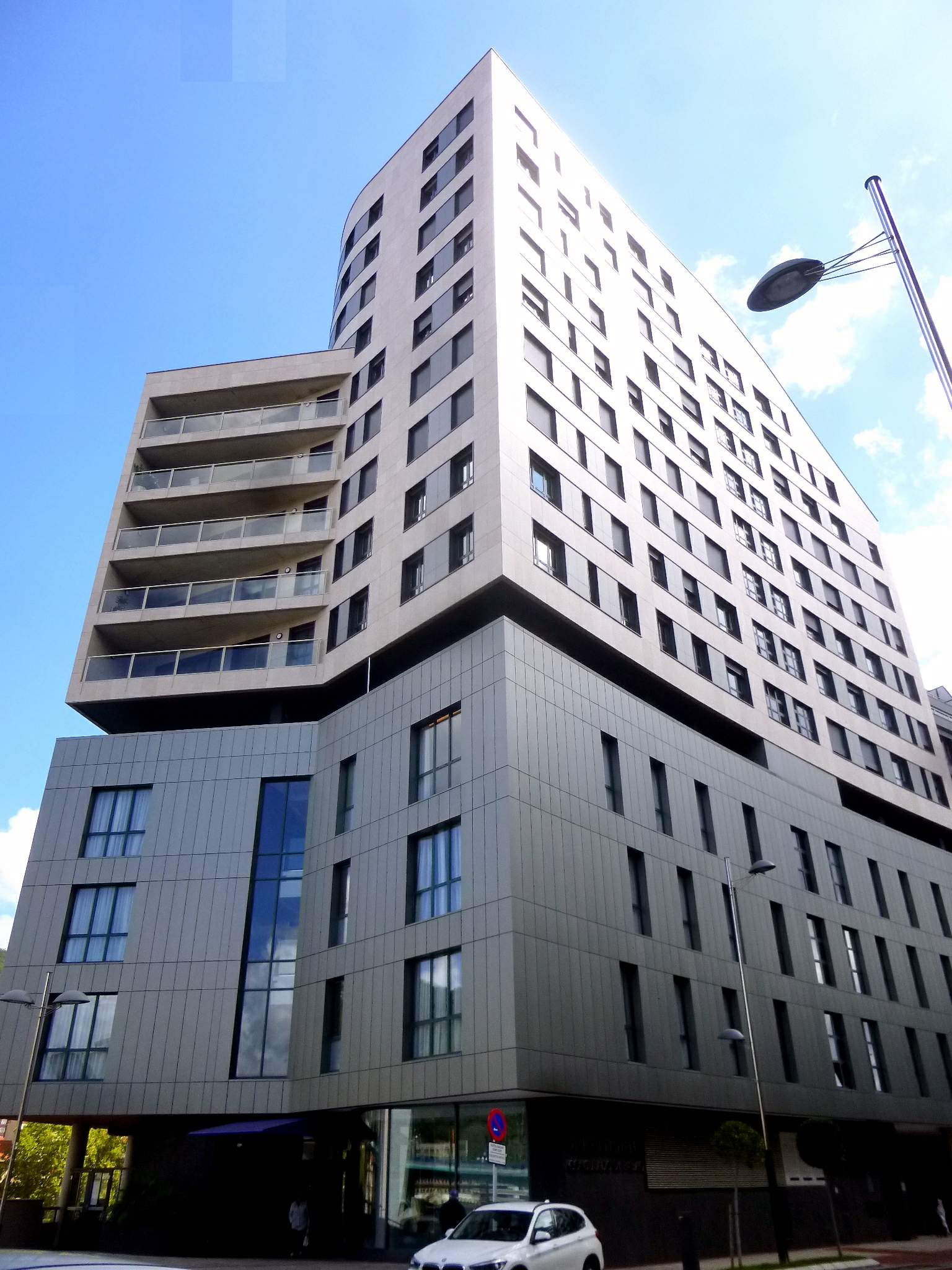 Hotel Vincci Consulado de Bilbao